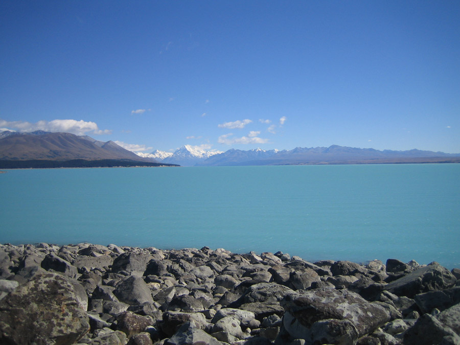 Photo Lac Pukaki (photo personnel 2006) Utilisateur:FRED